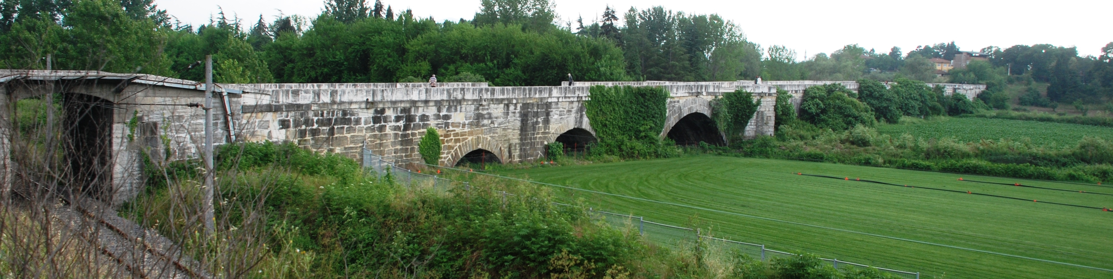 M.S. 553 -M.S. 561 yılları arasında Bizans İmparatoru Jüstinianus tarafından Sakarya nehri üzerine inşa ettirilen Beşköprü.Uzunluğu375m, genişliği 9,85m'dir.12 kemer gözlüdür.